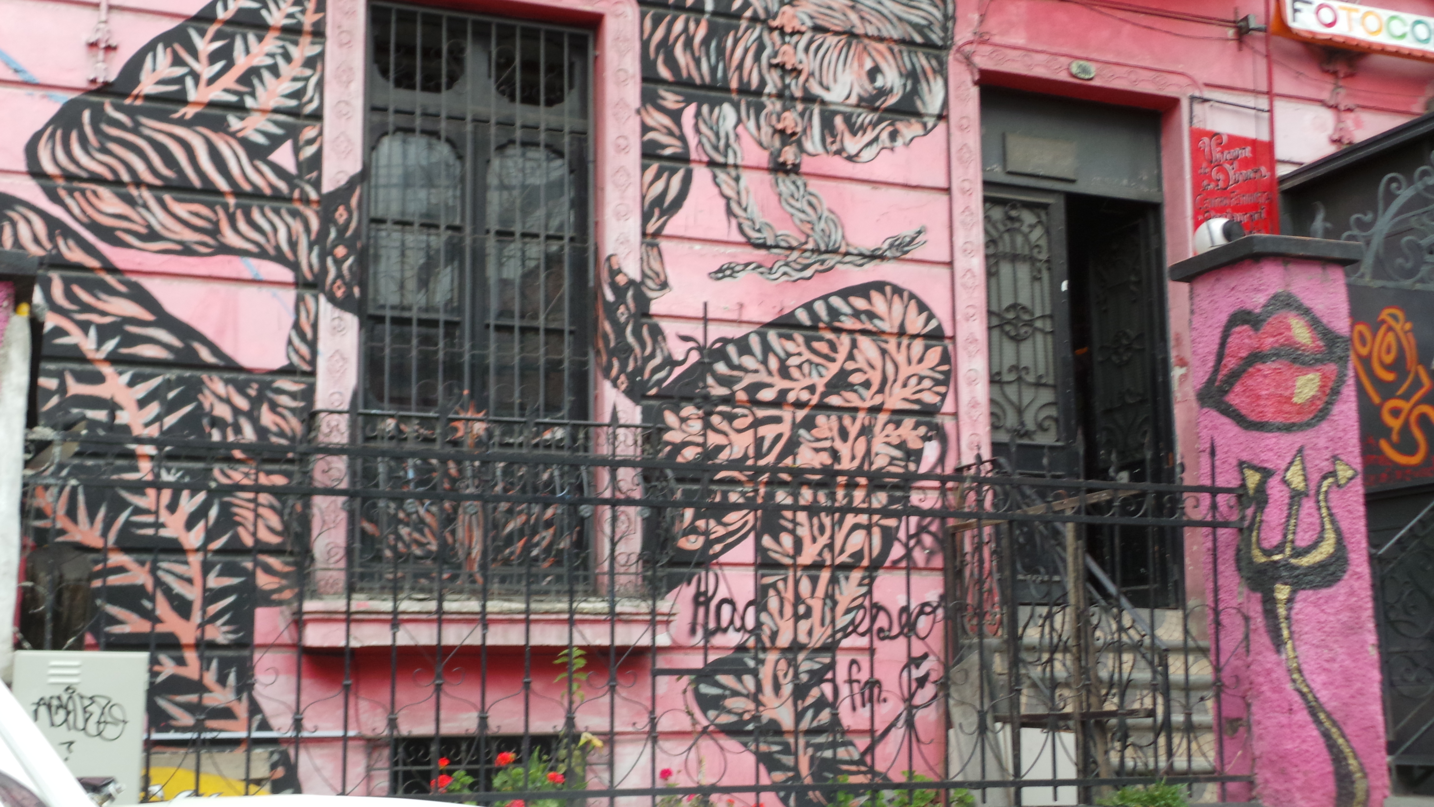 Fachada de la sede de Mujeres Creando en La Paz